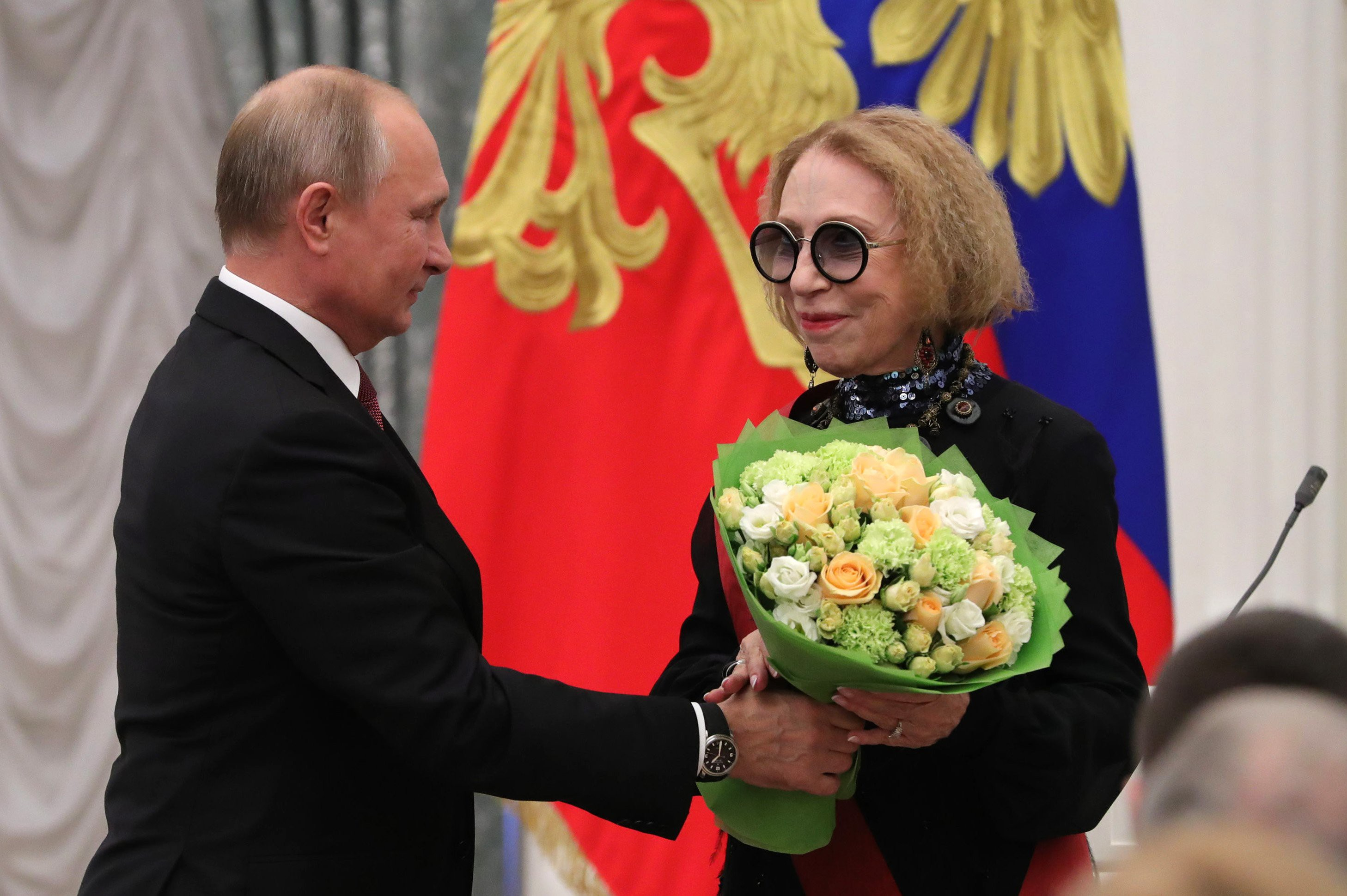 Вручение государственных наград. Орденом «За заслуги перед Отечеством» I степени награждена актриса Инна Чурикова.